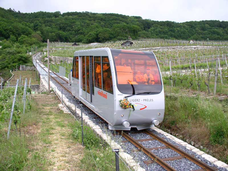 Neuer Wagen der Ligerz-Tessenberg-Bahn